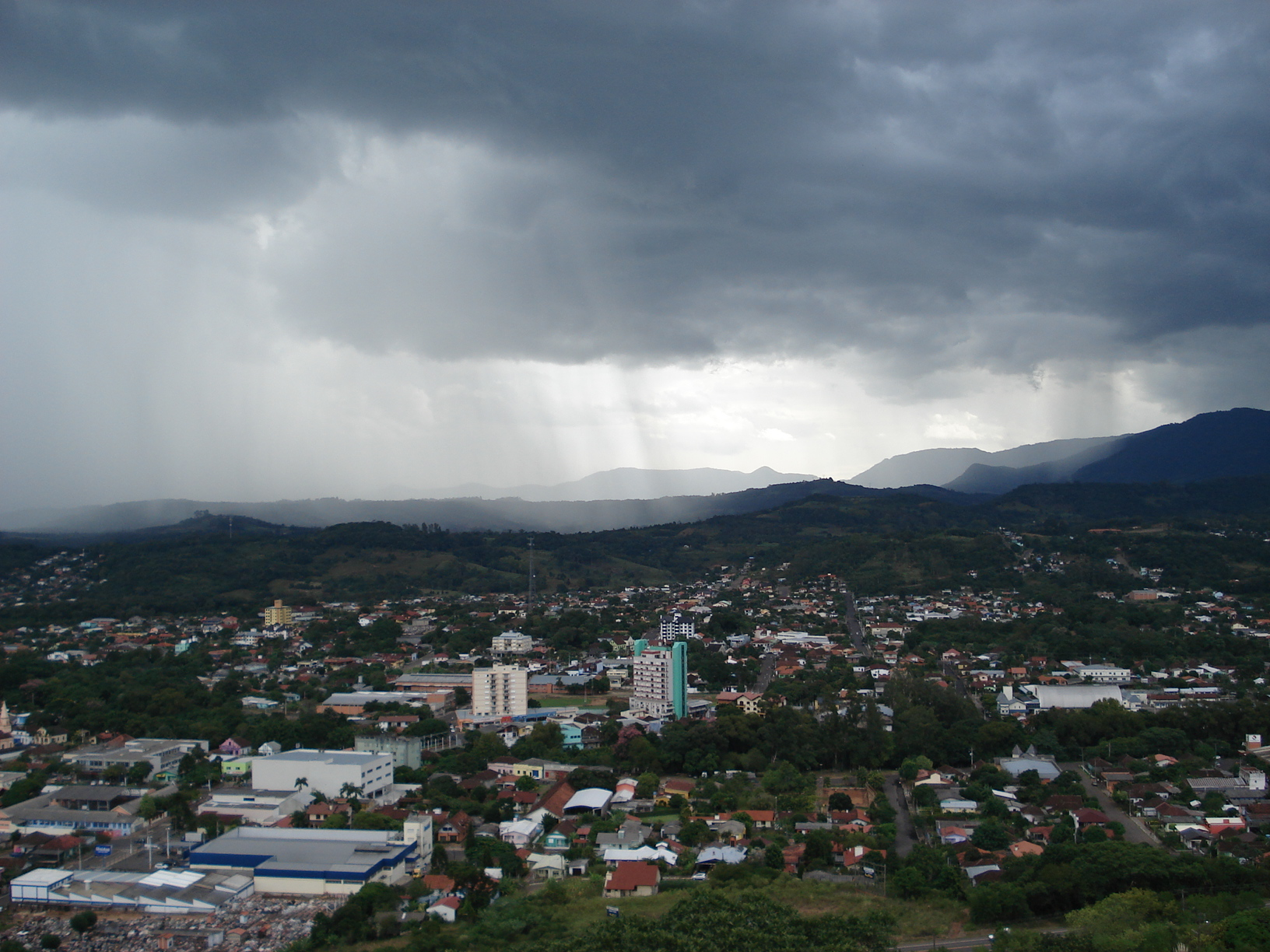 Vista da cidade de Igrejinha em um dia de chuva